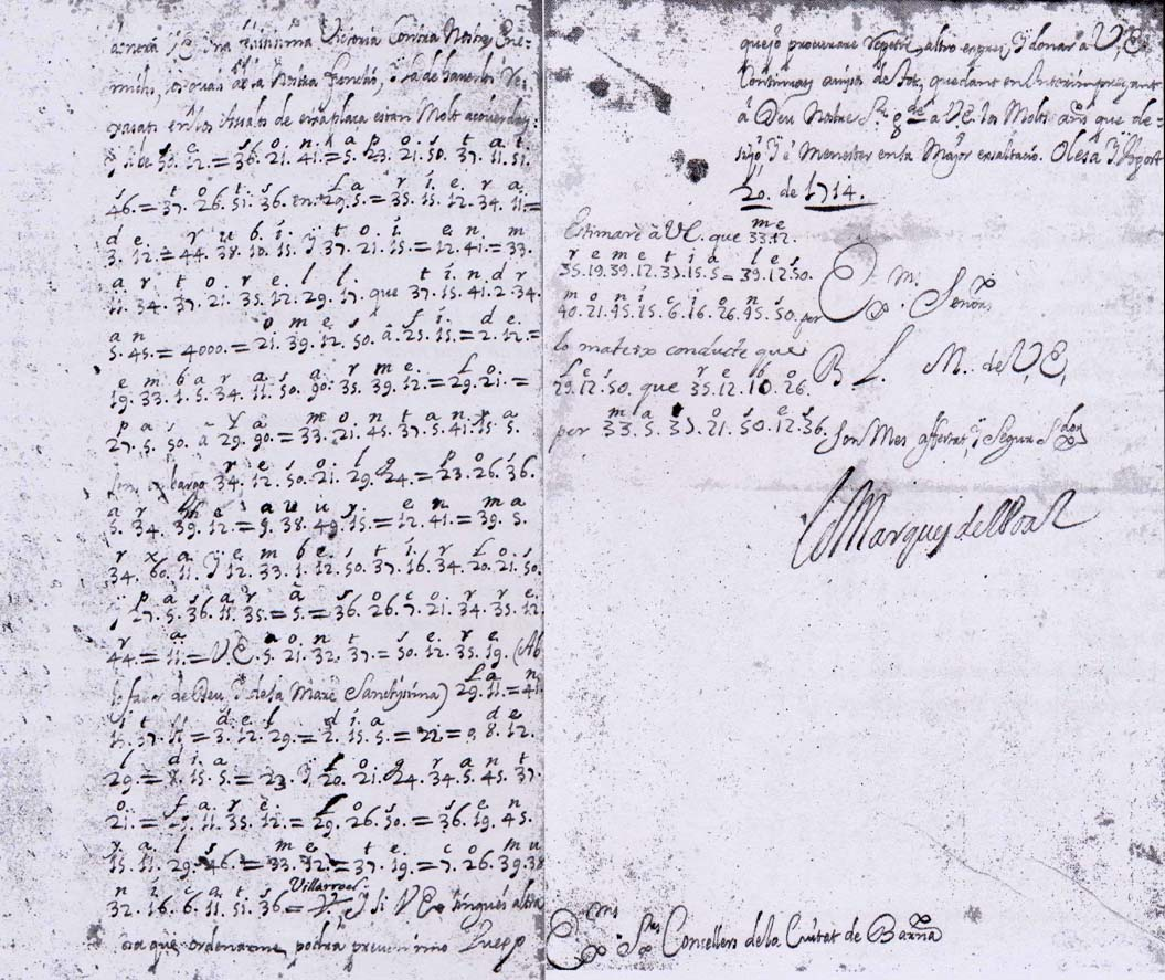 carta cifrada del coronel antonio desvalls a los consellers de barcelona en 1714 (anverso y reverso)